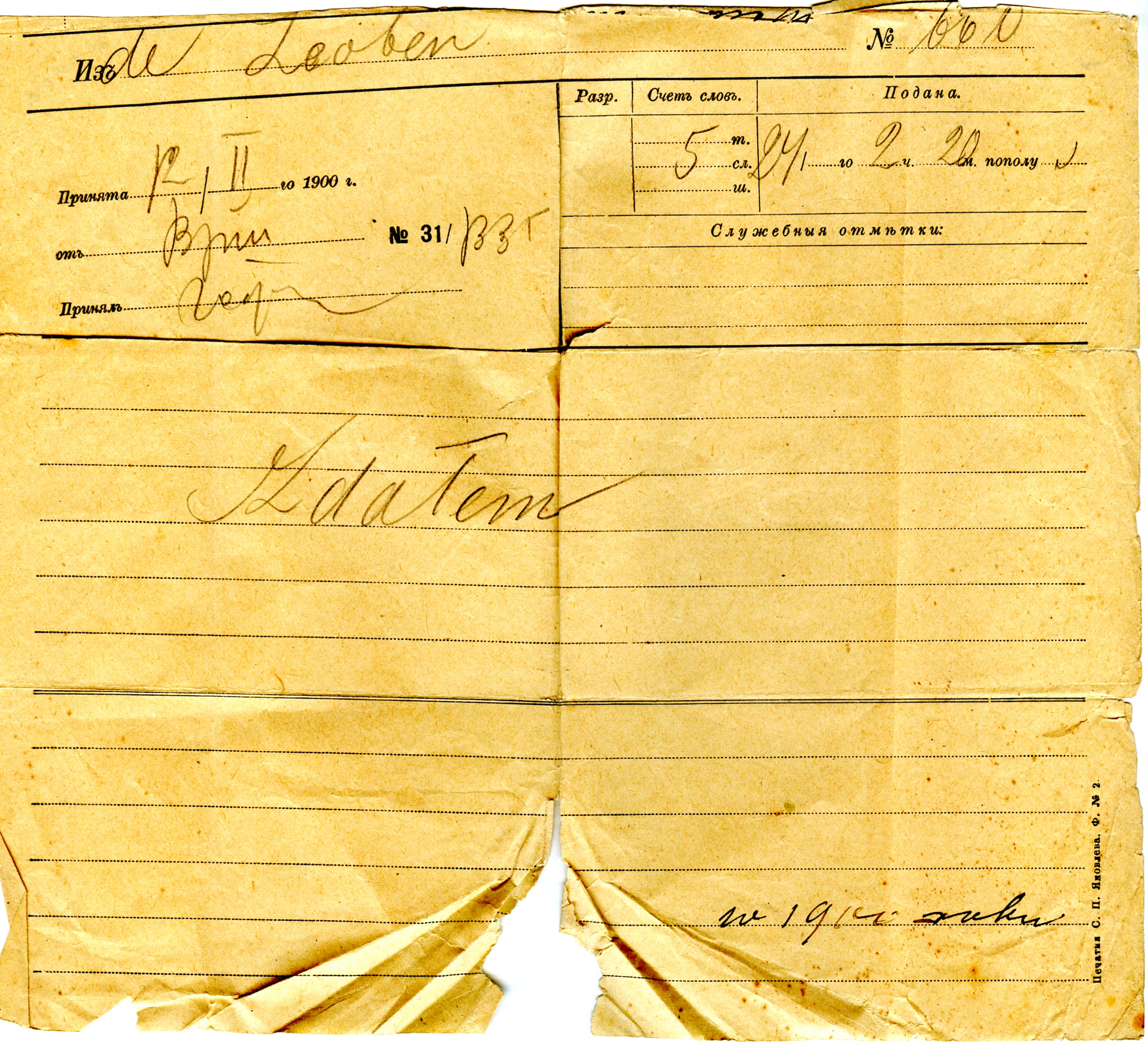 Telegram nadany z Leoben w Austrii do Warszawy w lutym 1900. Na drukowanym po rosyjsku formularzu widnieje jedno słowo po polsku: "Zdałem" (telegram nadany został po zaliczeniu ostatniego z egzaminów na uczelni górniczej przez Zygmunta Szczotkowskiego). Z formularza z górnej części oderwany jest prawdopodobnie fragment z adresem odbiorcy. Data na telegramie - 12.2.1900 - podana jest wg obowiązującego w zaborze rosyjskim starego stylu; wg używanego w Austrii kalendarza nowego stylu był to 24 lutego. Dopisek u dołu po prawej może być odczytany dwojako: "w 1900 roku" albo w "1914 roku"; ze względu na czas wytworzenia dokumentu bardziej prawdopodobna jest ta pierwsza interpretacja.